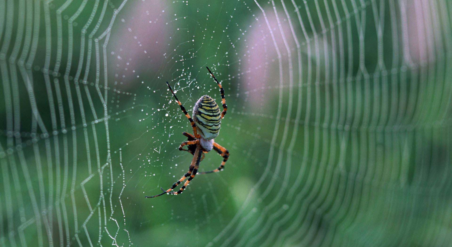 عنکبوت هراسی (Arachnophobia) ترسی شدید و غیر منطقی در مورد عنکبوت است